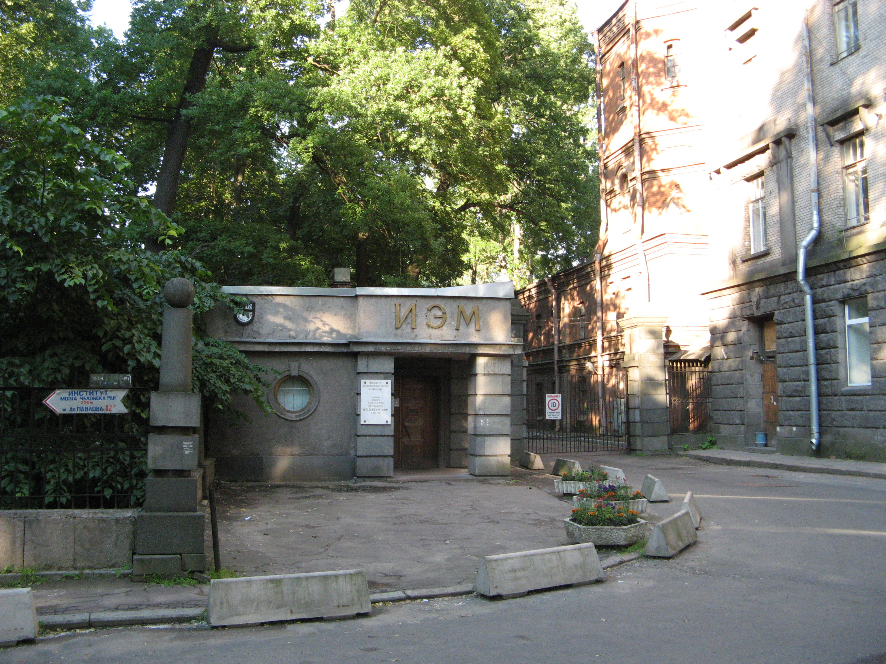 Институт экспериментальной медицины (Санкт-Петербург). проходная на ул. Академика Павлова, 12